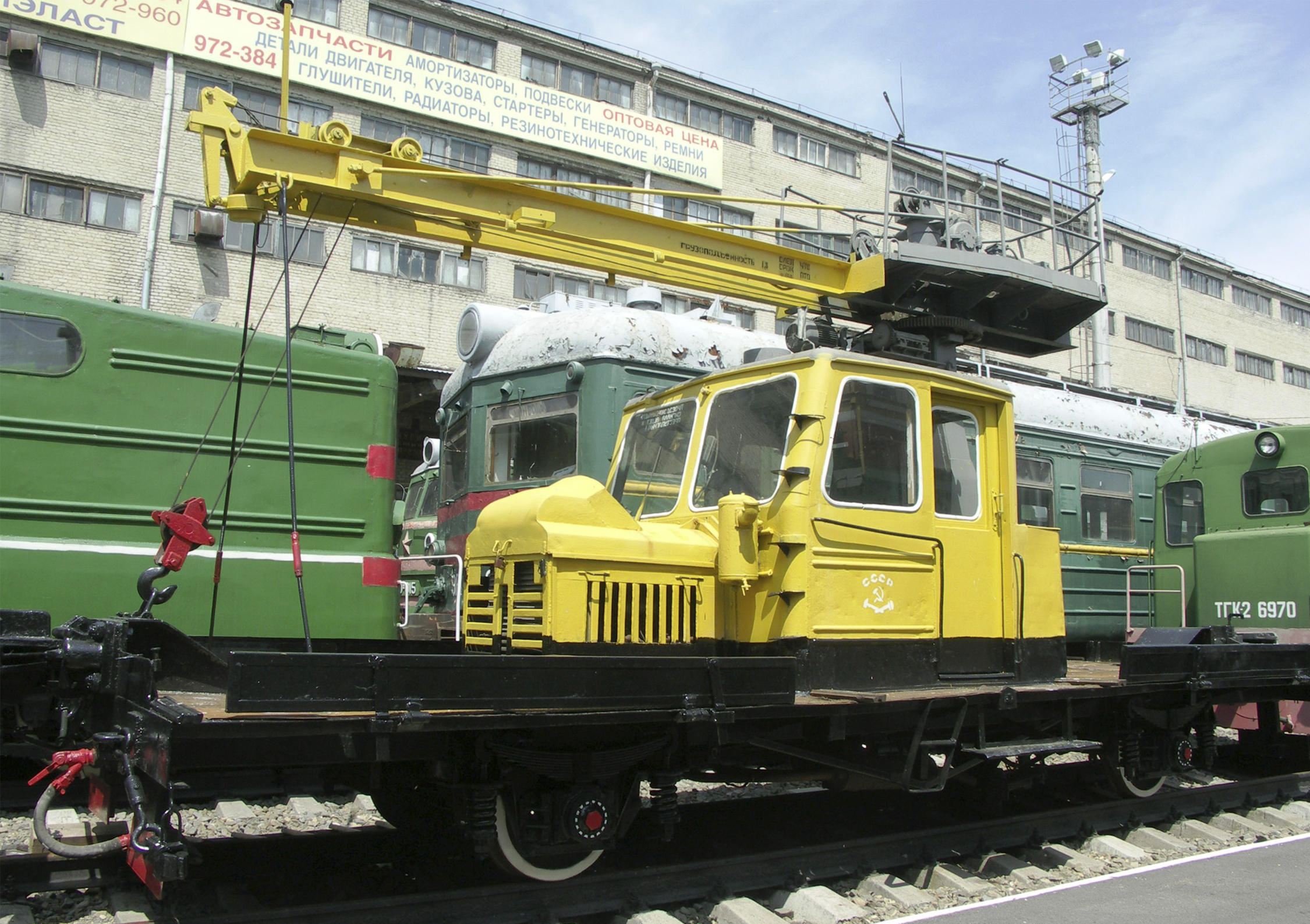 Автодрезина построена Пермским машиностроительным заводом в 1974 году